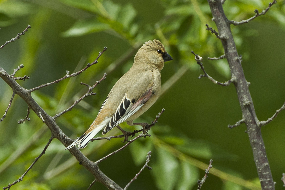 Desert Finch - Uzbekistan_S4E7626-2